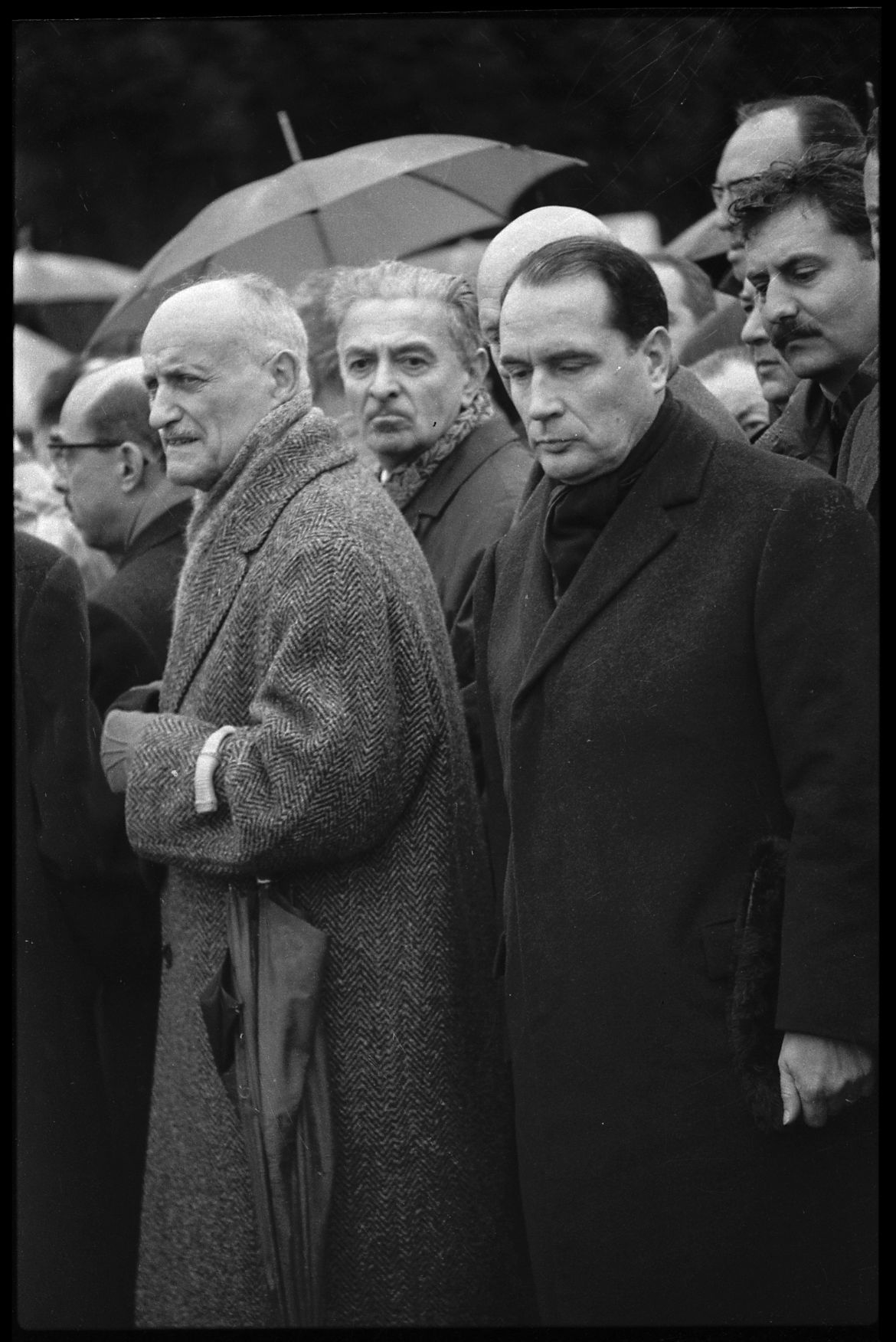 Cimetière de Muret (Haute-Garonne). 3 Janvier 1966. Vue de François Mitterand aux obsèques de Vincent Auriol.